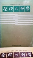 성경과 신학, 한국복음주의신학회 학회지